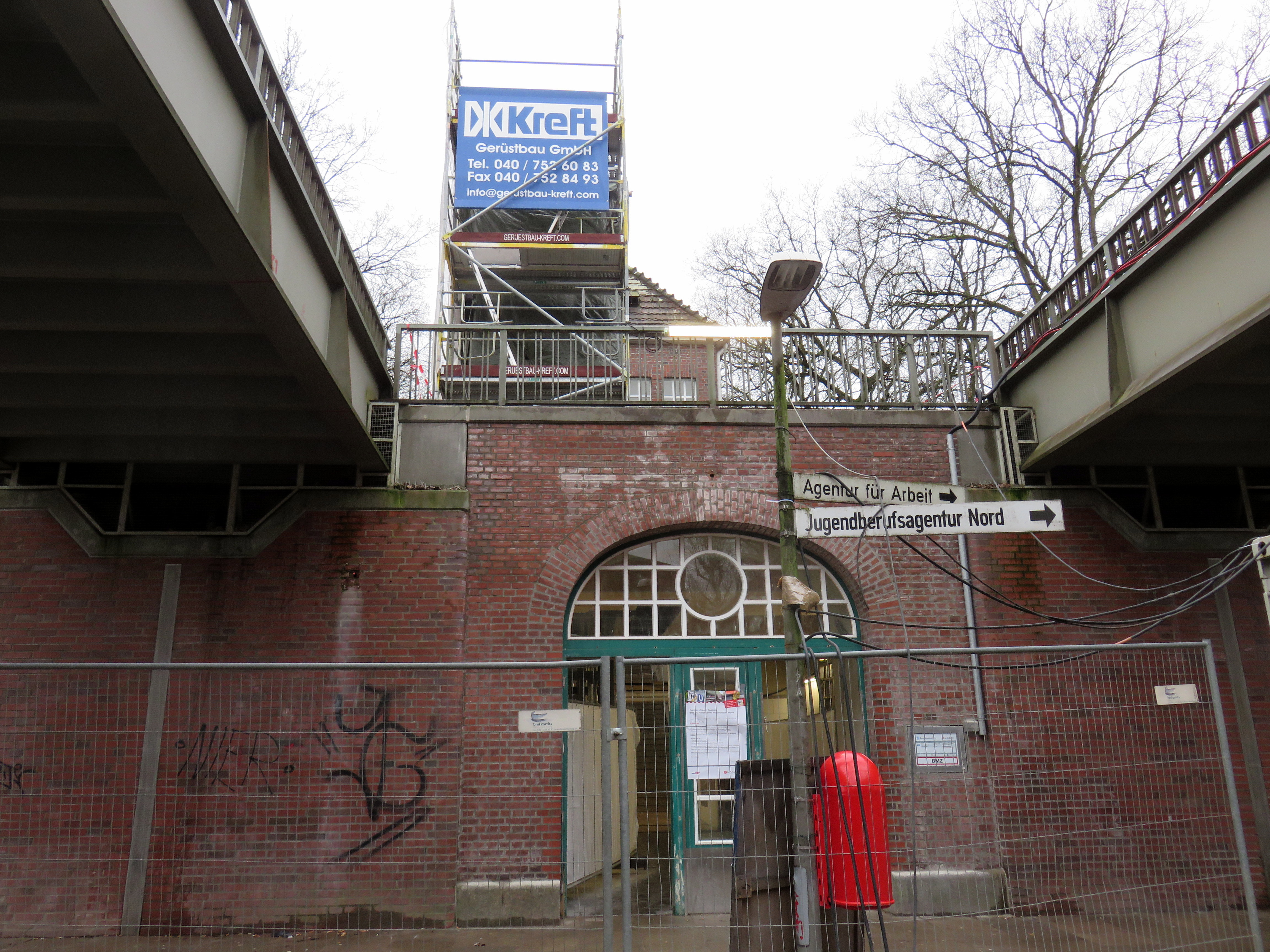 Bauarbeiten für den barrierefreien Zugang (Fahrstuhl) am U-Bahnhof Fuhlsbüttel Nord in Hamburg-Fuhlsbüttel. Zustand Februar 2020.